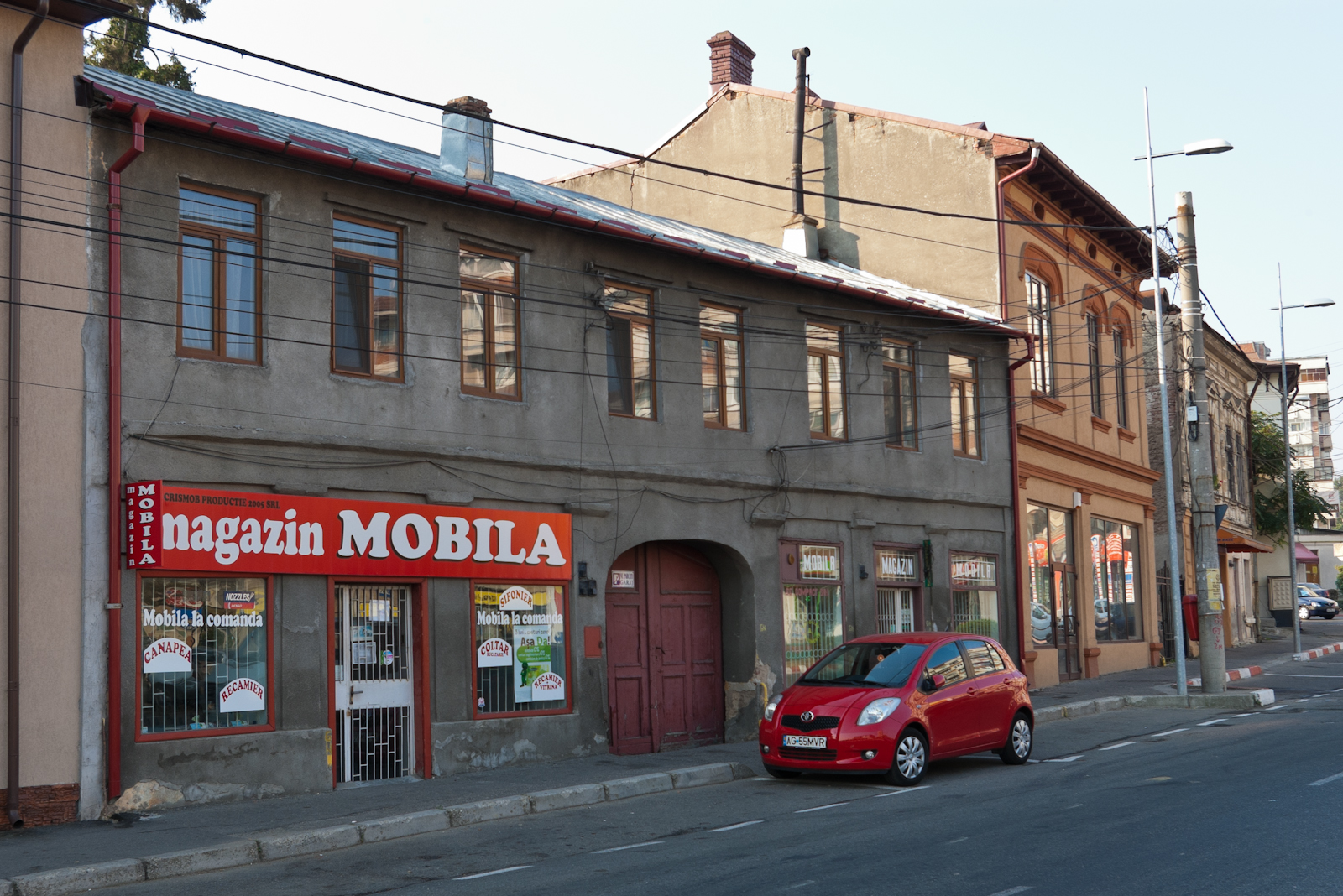 Fotografia prezinta Casa Zeiller-Keller vazuta dinspre NV.